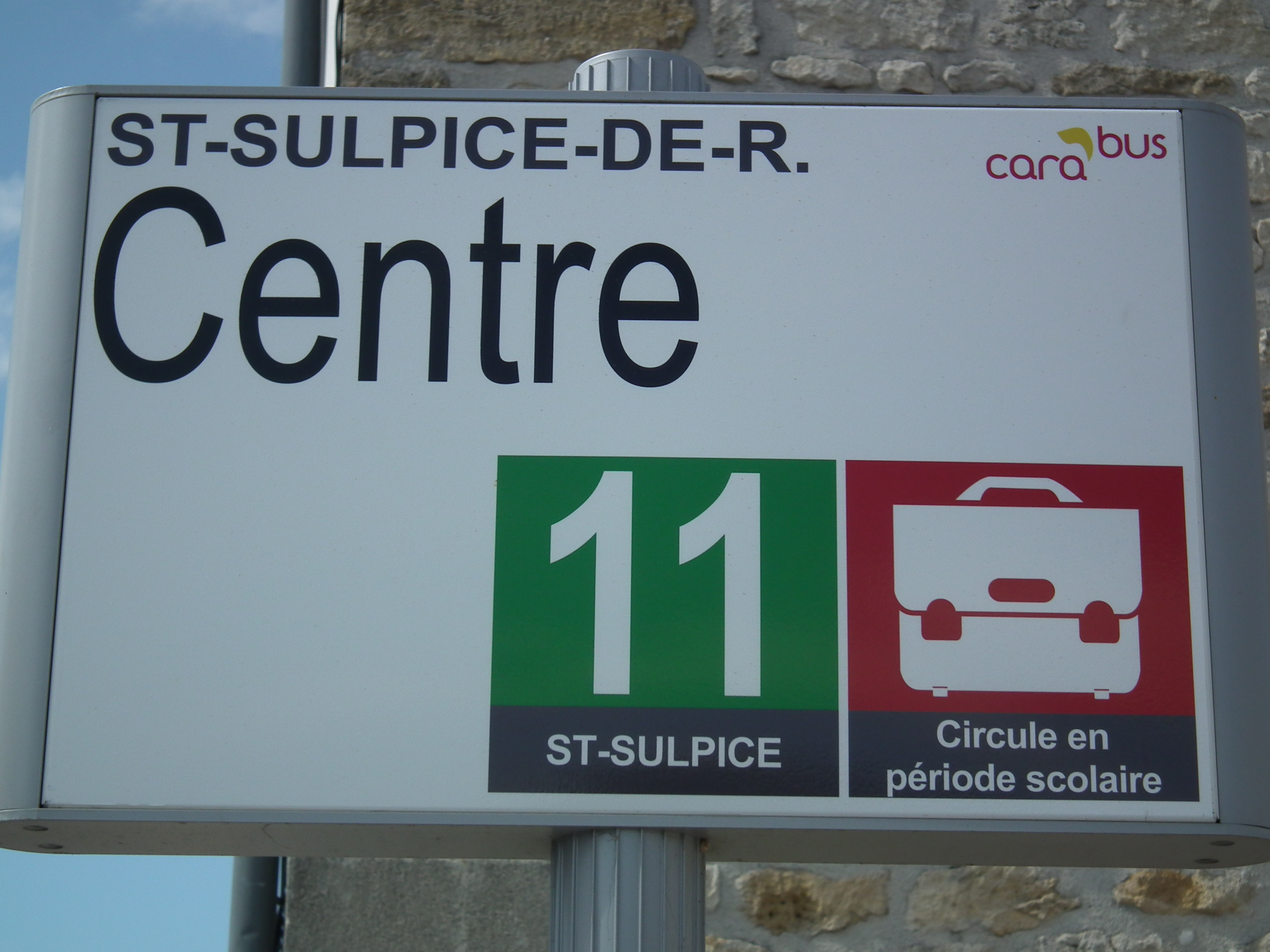 Arrêt de bus à Saint-Sulpice-de-Royan